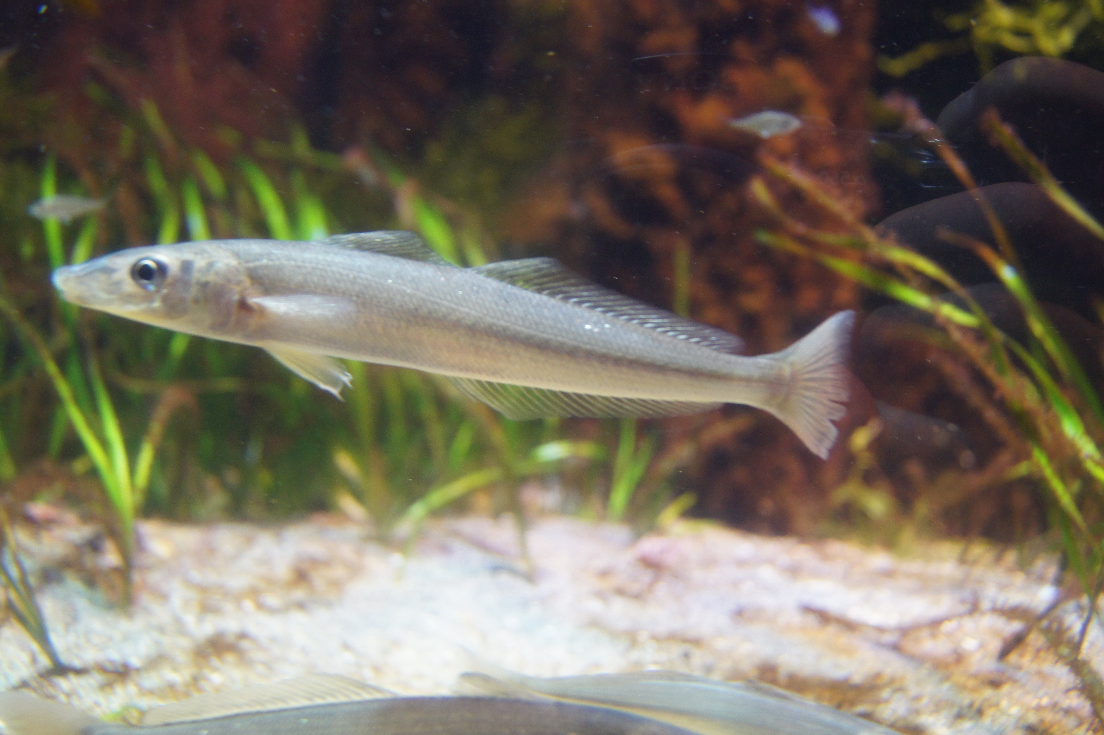 アオギス（江ノ島水族館にて撮影